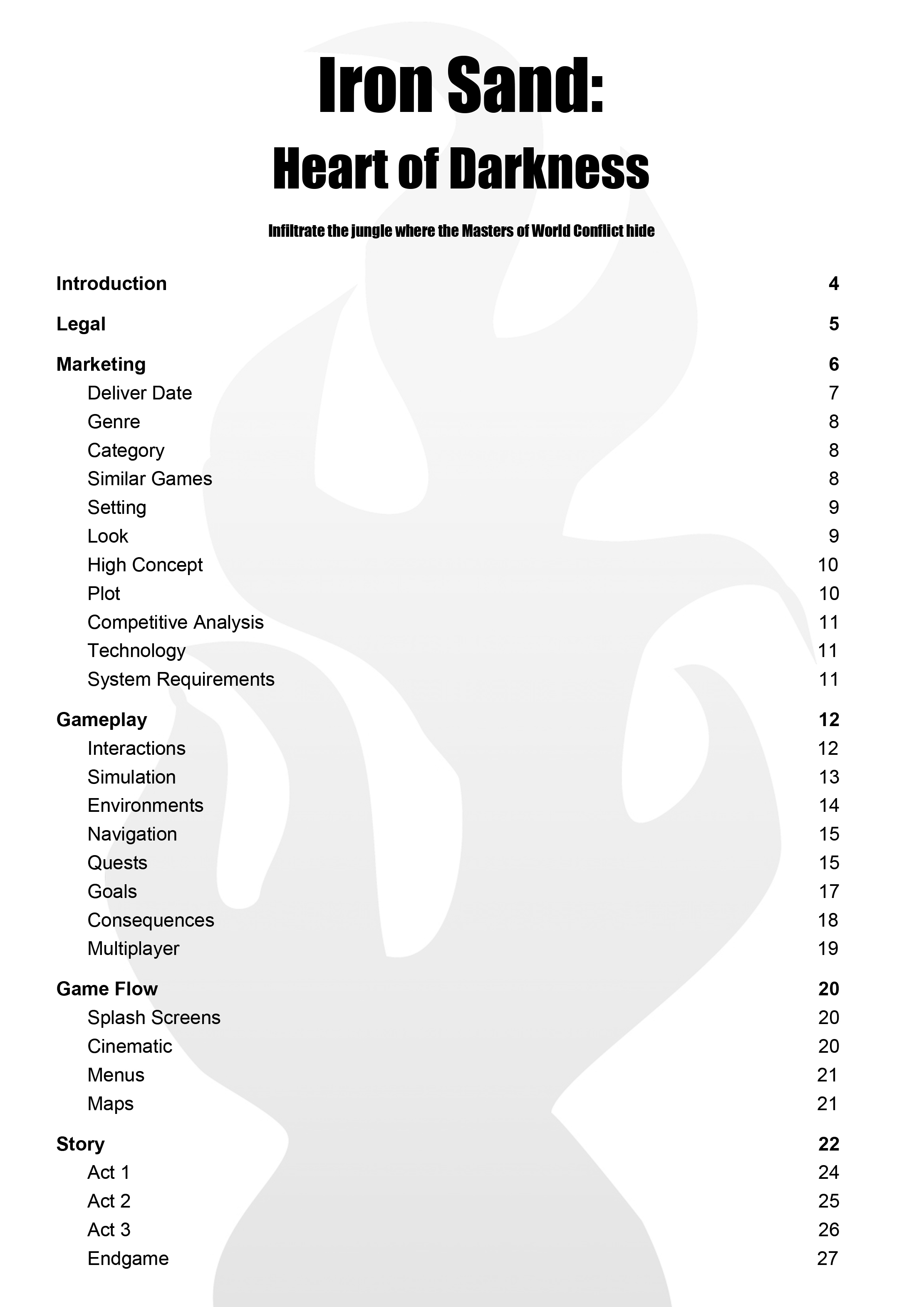 Esempio di GDD